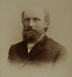 German botanist Georg Albrecht Klebs (1857-1913)